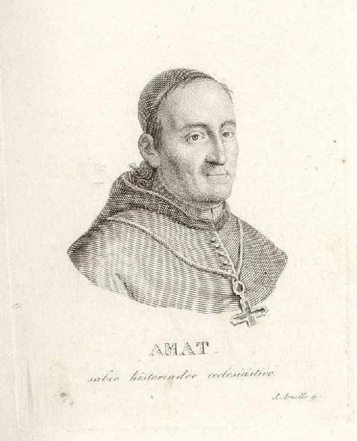 Retrato de Félix Amat, grabado al aguafuerte y buril de Juan Amills. Inscripción: Amat: Sabio historiador eclesiástico. Biblioteca Nacional de España.